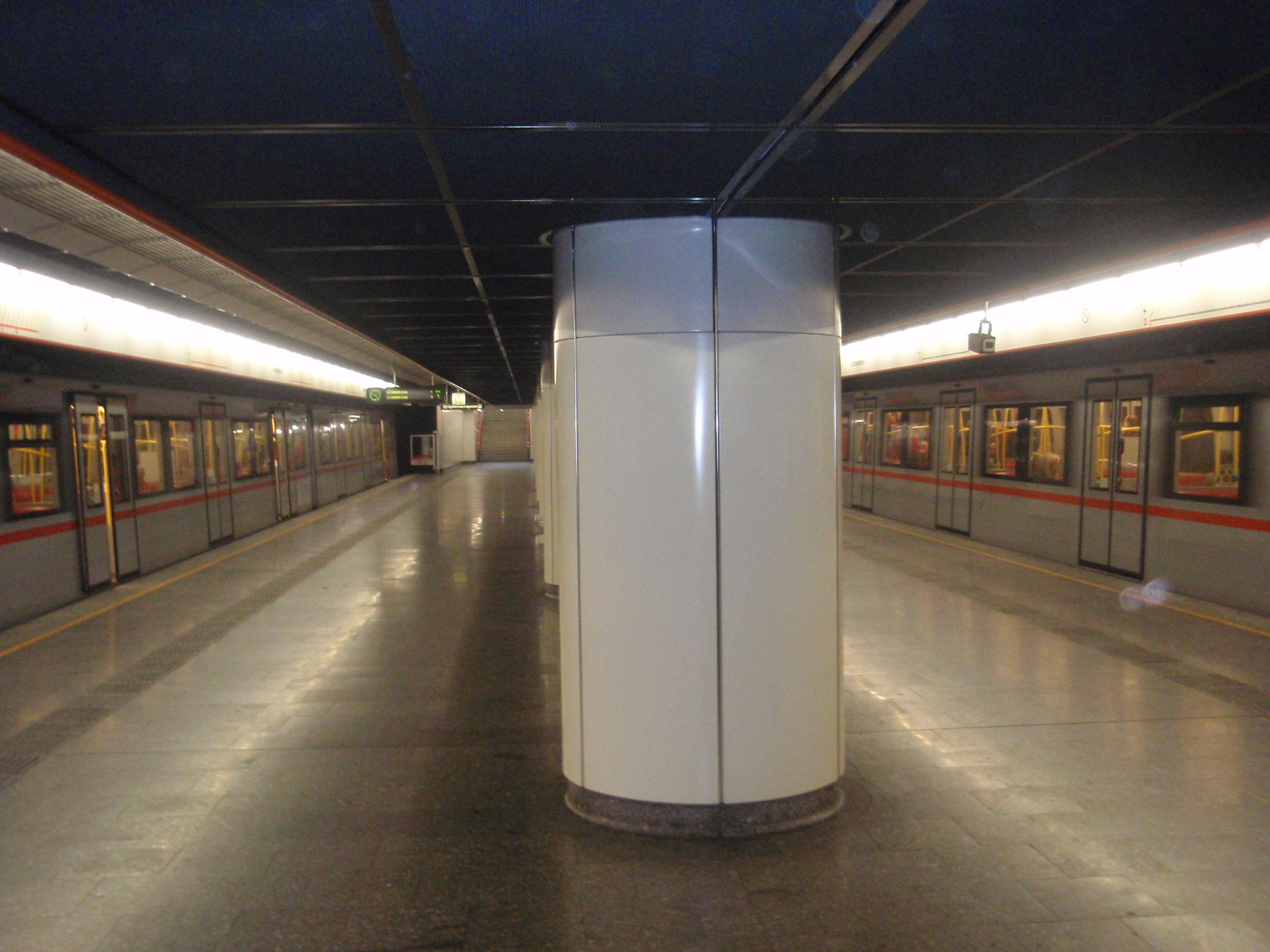 U3-Station Kendlerstraße